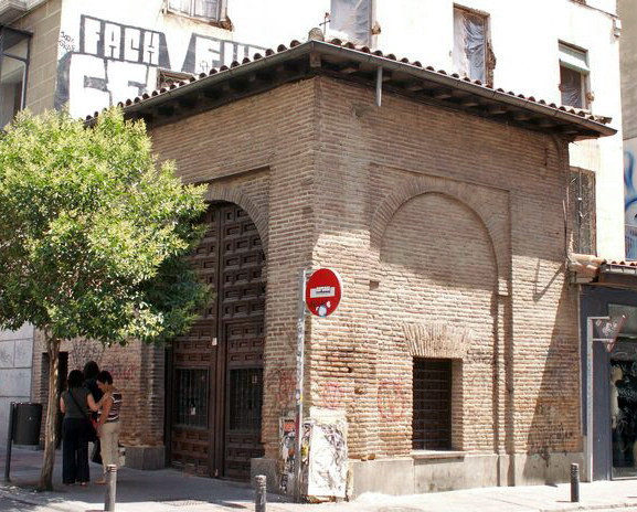 Ermita del Humilladero, situada en la esquina entre las calles Fuencarral y Augusto Figueroa, Madrid. Data de 1712.